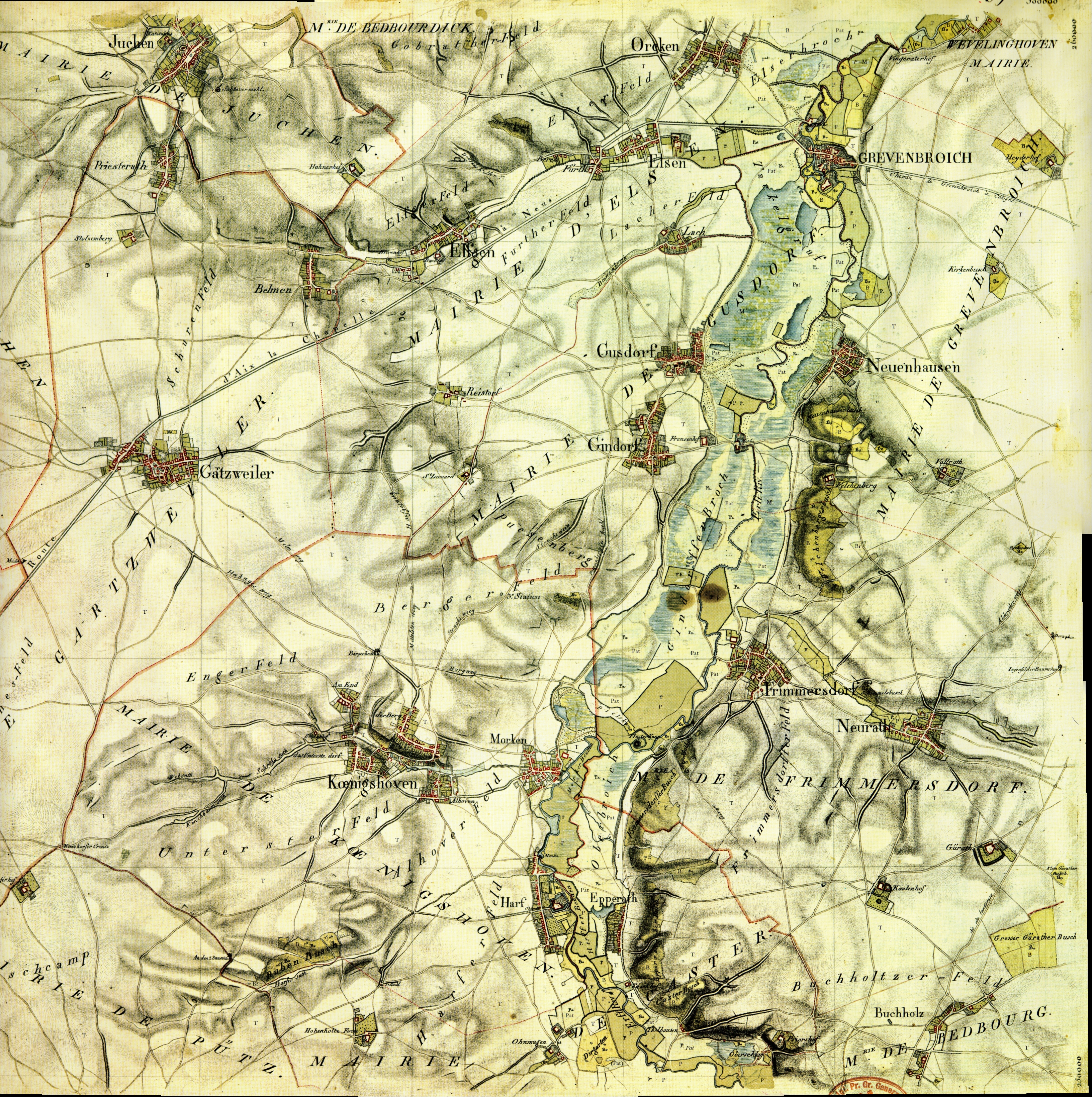 Kartenaufnahme der Rheinlande durch Tranchot und von Müffling 1803-1820 Blatt 59 - Grevenbroich; hier Detail oben links